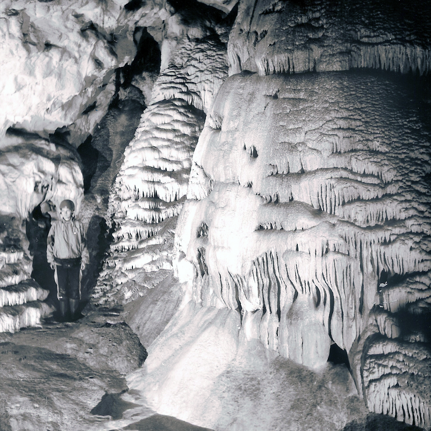 Szolcsvai Búvópatak barlangja, a Karácsonyfa, Erdély